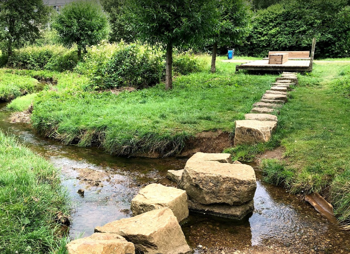 jj